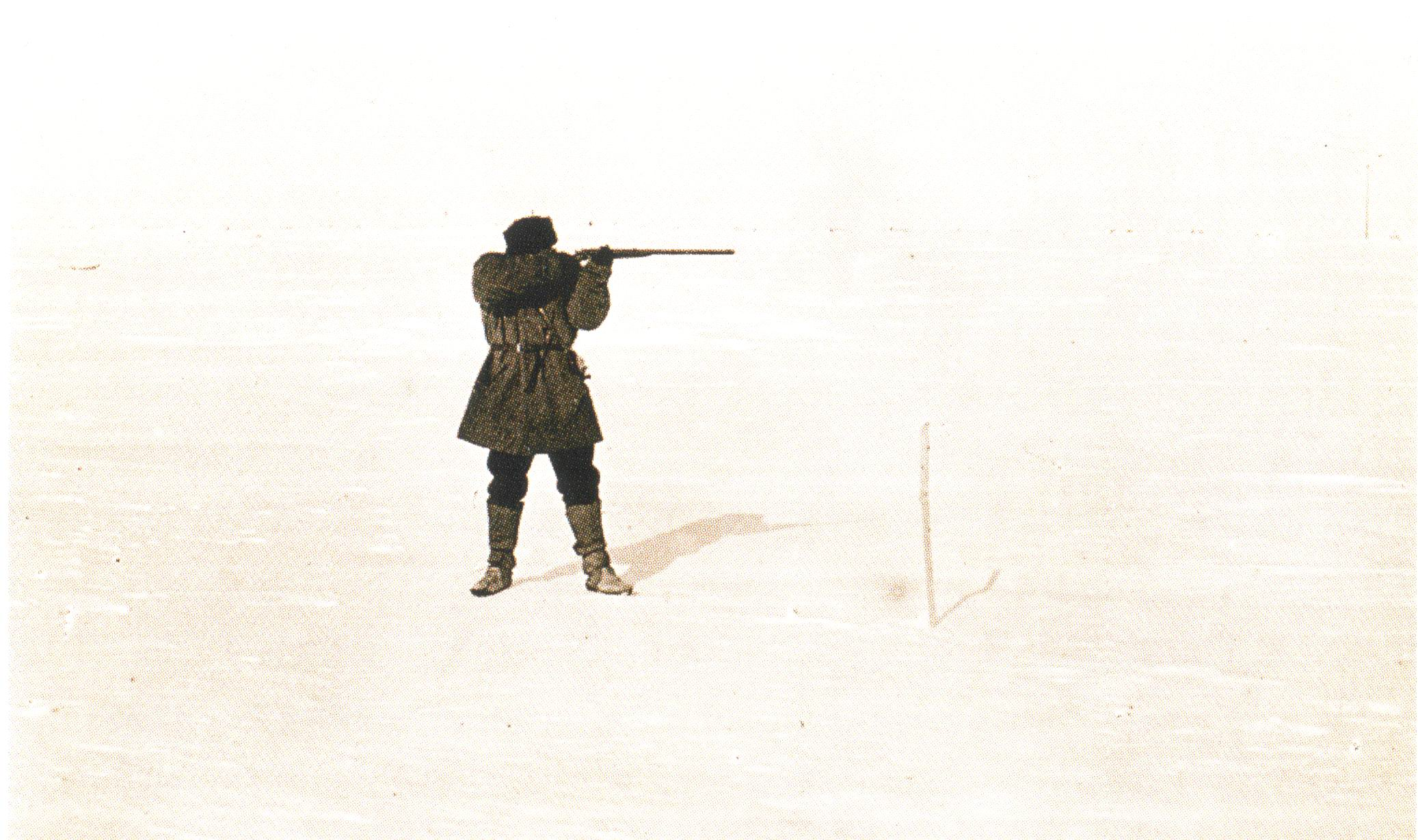 Лейтенант А.В. Колчак на охоте. О-в Котельный, 1902 г.